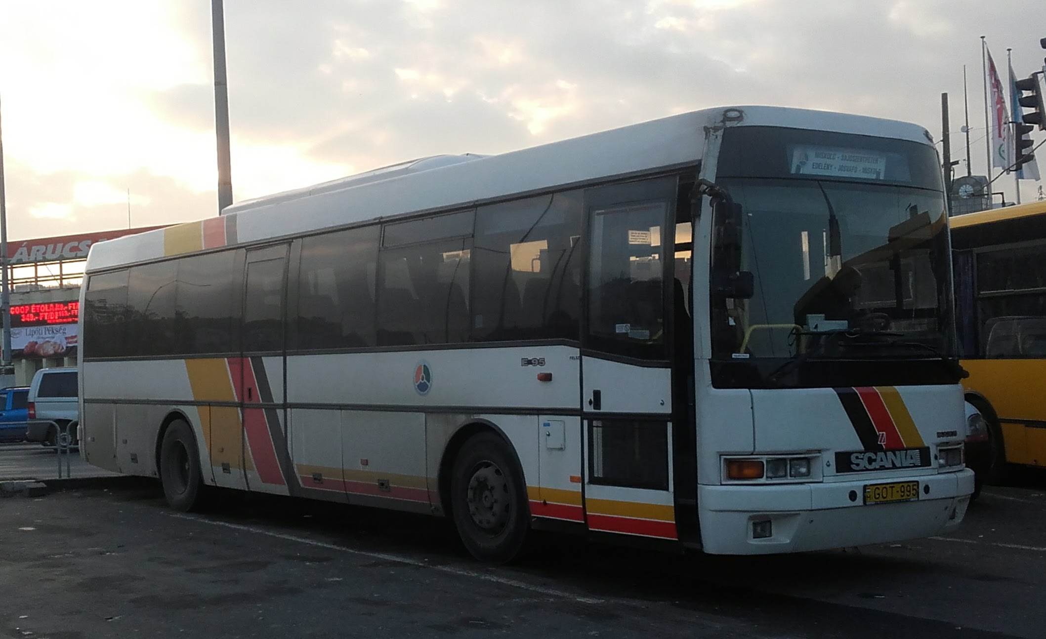 Az ÉMKK GOT-995 rendszámú Ikarus E95 típusú busza Miskolcon, a 3704-es helyközi járaton.